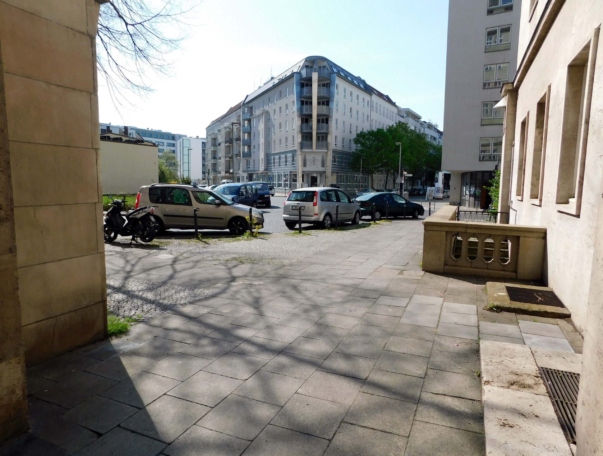 Blick vom Durchgang von der Karl-Marx-Allee zur Kadiner Straße auf das Praxis-Wohngebäude Kadiner Straße 23 / Hildegard-Jadamowitz-Straße 20 mit der futuristisch gestalteten abgeschrägten Ecke. Links vom Eckgebäude sind die letzten Häuser der Hildegard-Jadamowitz-Straße zu sehen und dahinter die rückwärtige Häuserfront der Warschauer Straße. Vor der Überbauung der Warschauer Straße gehörte dieser Teil der Hildegard-Jadamowitz-Straße zur Boxhagener Straße.